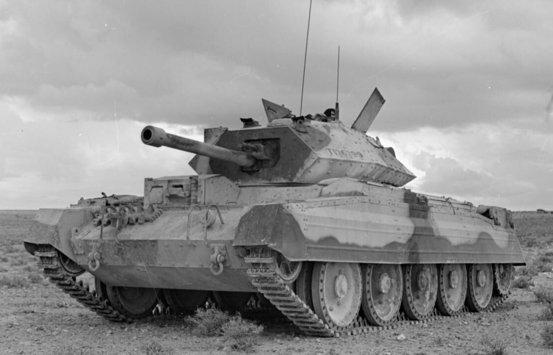 THE BRITISH ARMY IN NORTH AFRICA 1943; A Crusader Mk III tank